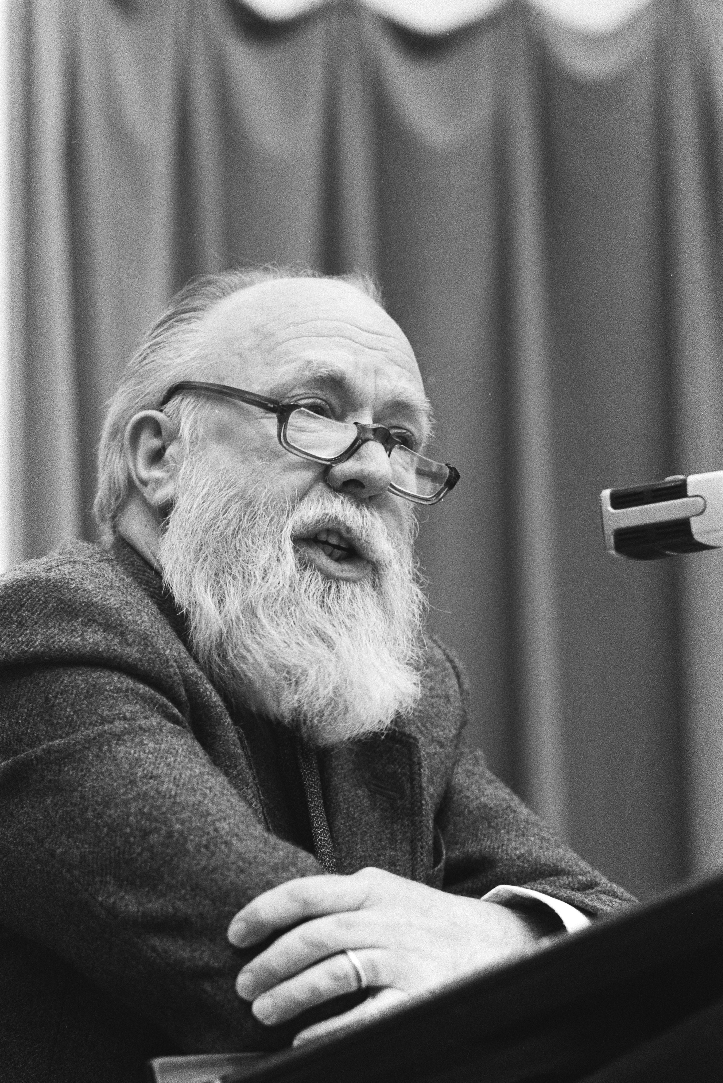 Collectie / Archief : Fotocollectie Anefo Reportage / Serie : Onderwijsdebat in de Tweede Kamer Beschrijving : PvdA-woordvoerder Konings Datum : 8 maart 1983 Locatie : Den Haag, Zuid-Holland Trefwoorden : onderwijs, parlementaire debatten, parlementariërs, politiek, portretten Persoonsnaam : Konings, M.J. Instellingsnaam : PvdA, Tweede Kamer Fotograaf : Croes, Rob C. / Anefo Auteursrechthebbende : Nationaal Archief Materiaalsoort : Negatief (zwart/wit) Nummer archiefinventaris : bekijk toegang 2.24.01.05 Bestanddeelnummer : 932-5242